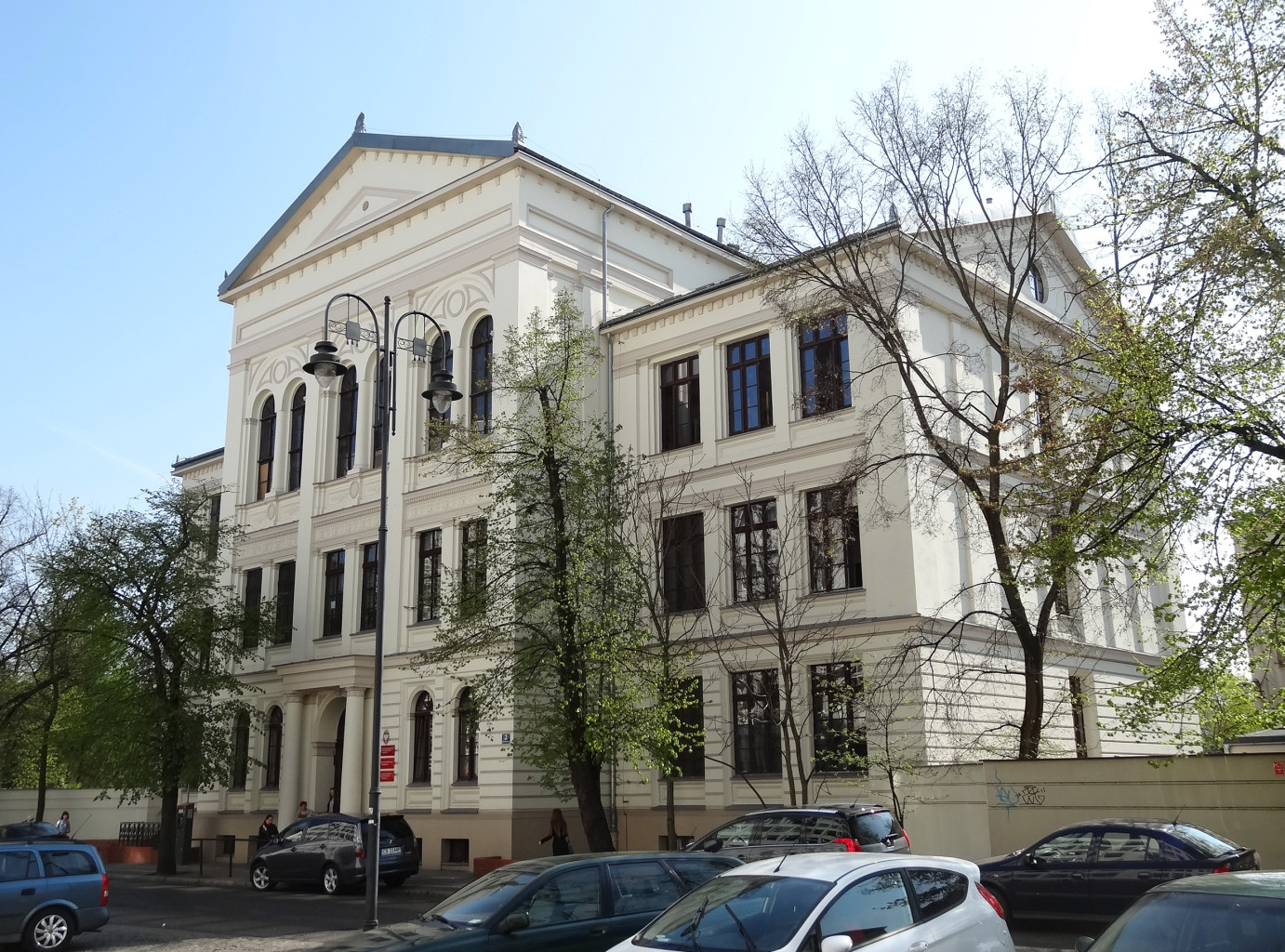 Budynek Zespołu Szkół Plastycznych w Bydgoszczy (1875-1878, Heinrich Grüder) przy ul. Konarskiego